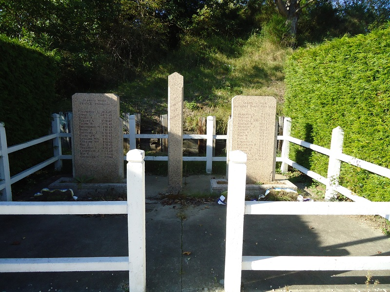 Le sentier de l'île du castor, à Challuy